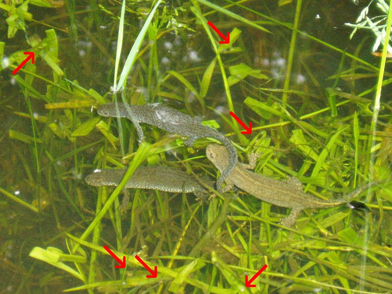 Triturus alpestris